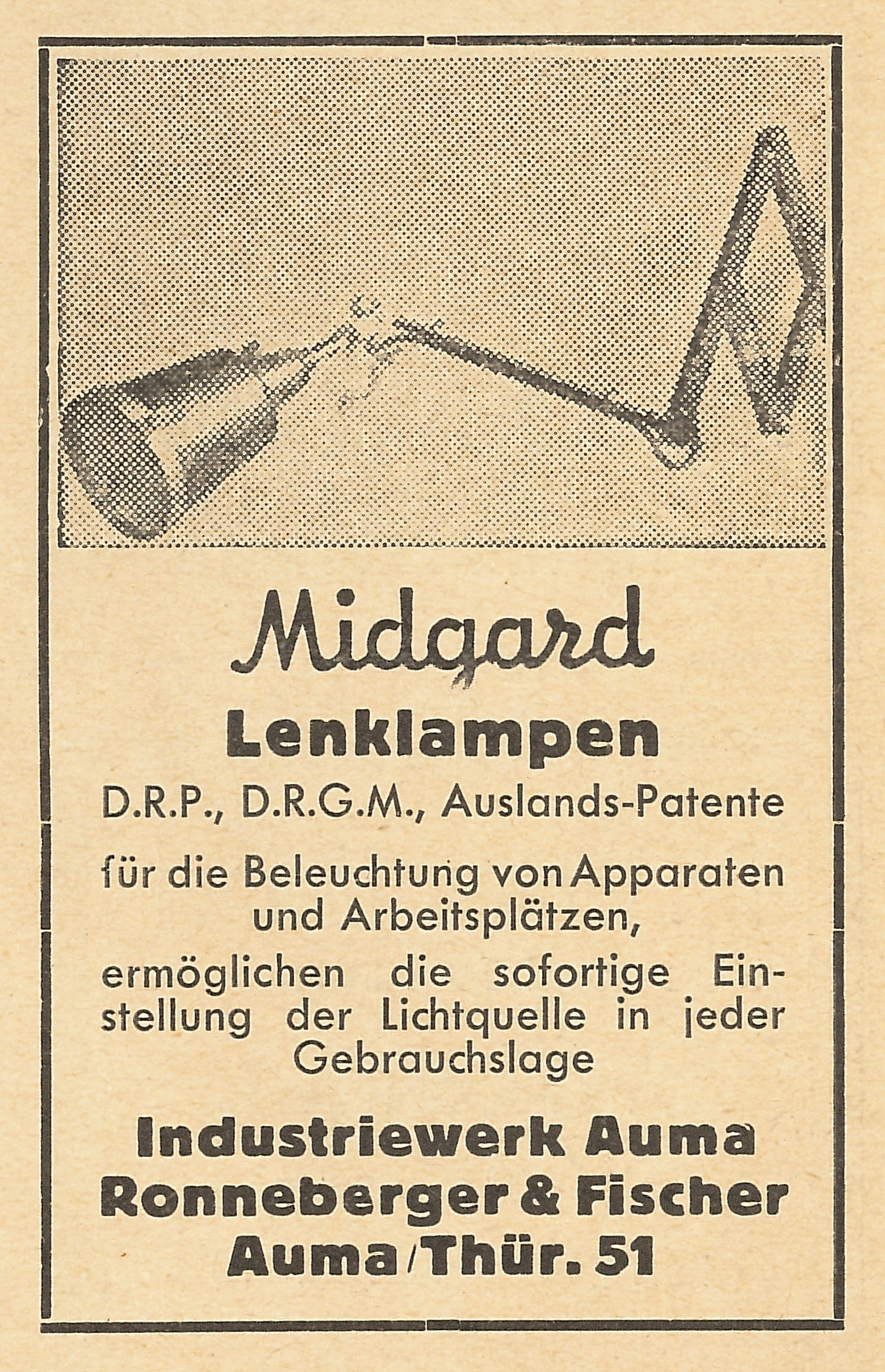 Printwerbung der Firma Industriewerk Auma zur Bewerbung von Midgard Lenklampen